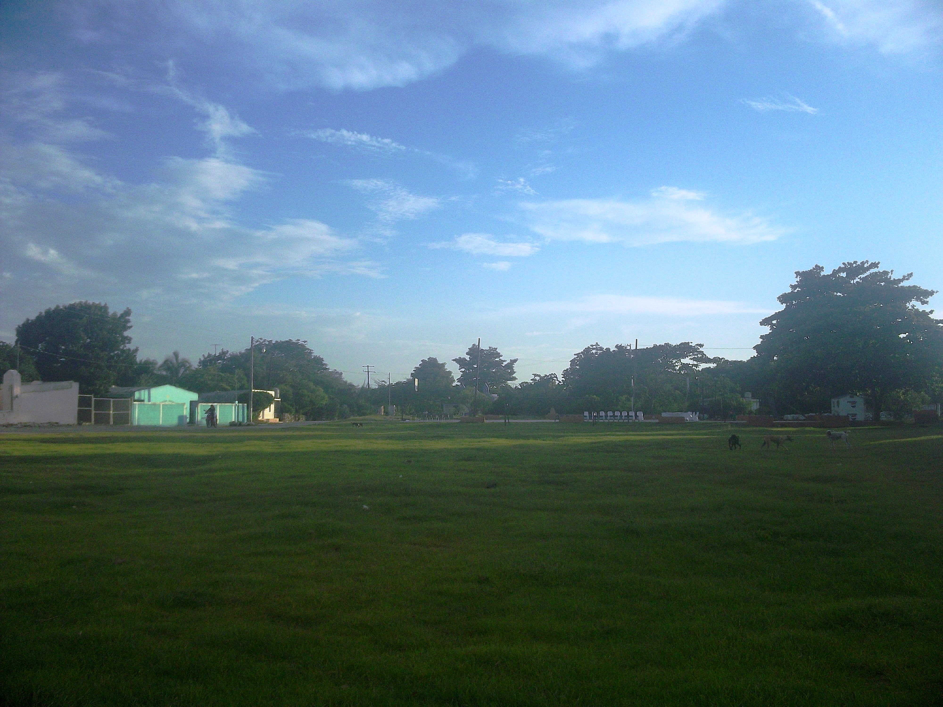 Vista del parque principal de Kancabchén, Yucatán.